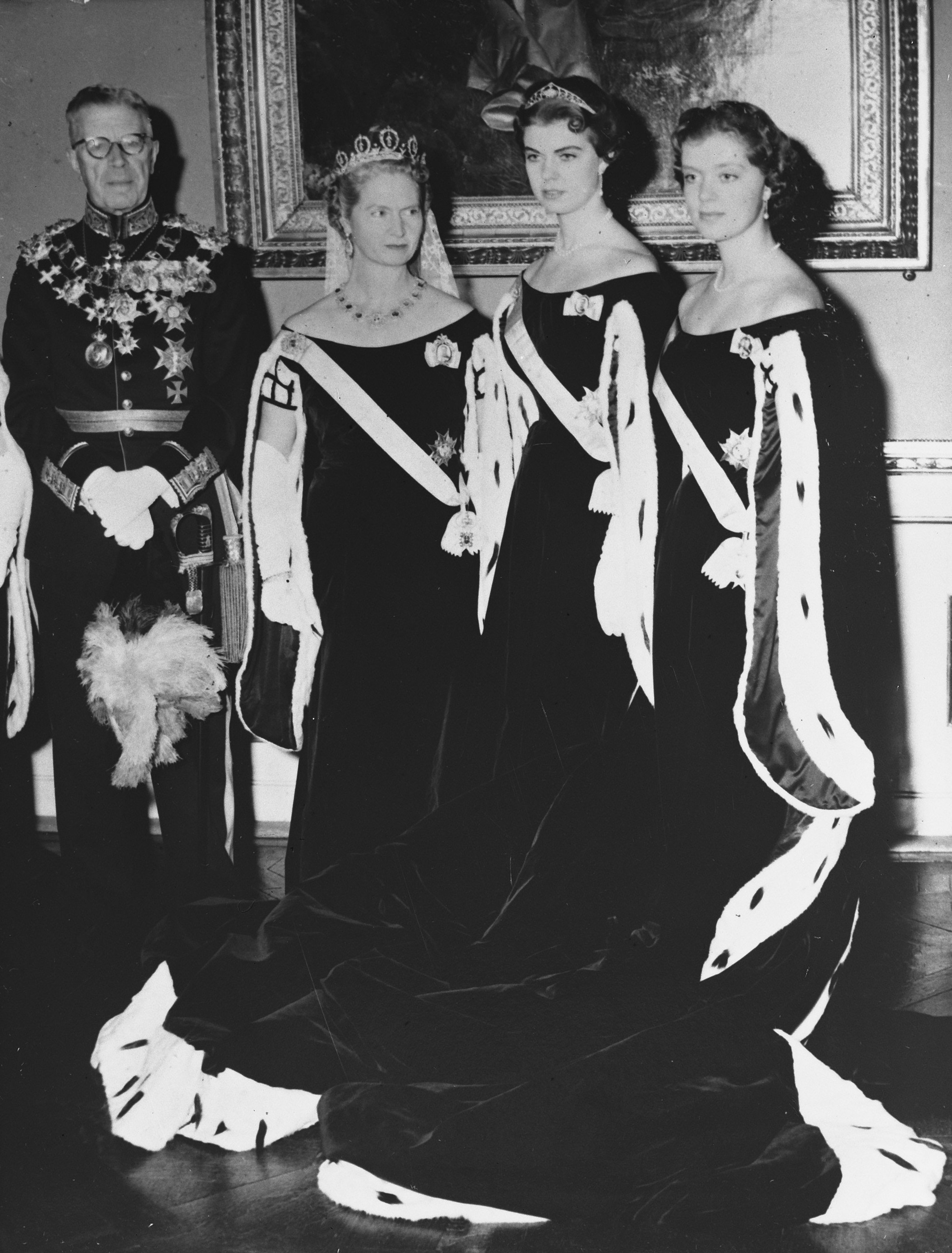 Collectie / Archief : Fotocollectie Anefo Reportage / Serie : [ onbekend ] Beschrijving : Opening Zweedse Rijksdag Datum : 13 januari 1956 Trefwoorden : Openingen Persoonsnaam : RIJKSDAG Fotograaf : Fotograaf Onbekend / Anefo Auteursrechthebbende : Nationaal Archief Materiaalsoort : Glasnegatief Nummer archiefinventaris : bekijk toegang 2.24.01.09 Bestanddeelnummer : 907-5379